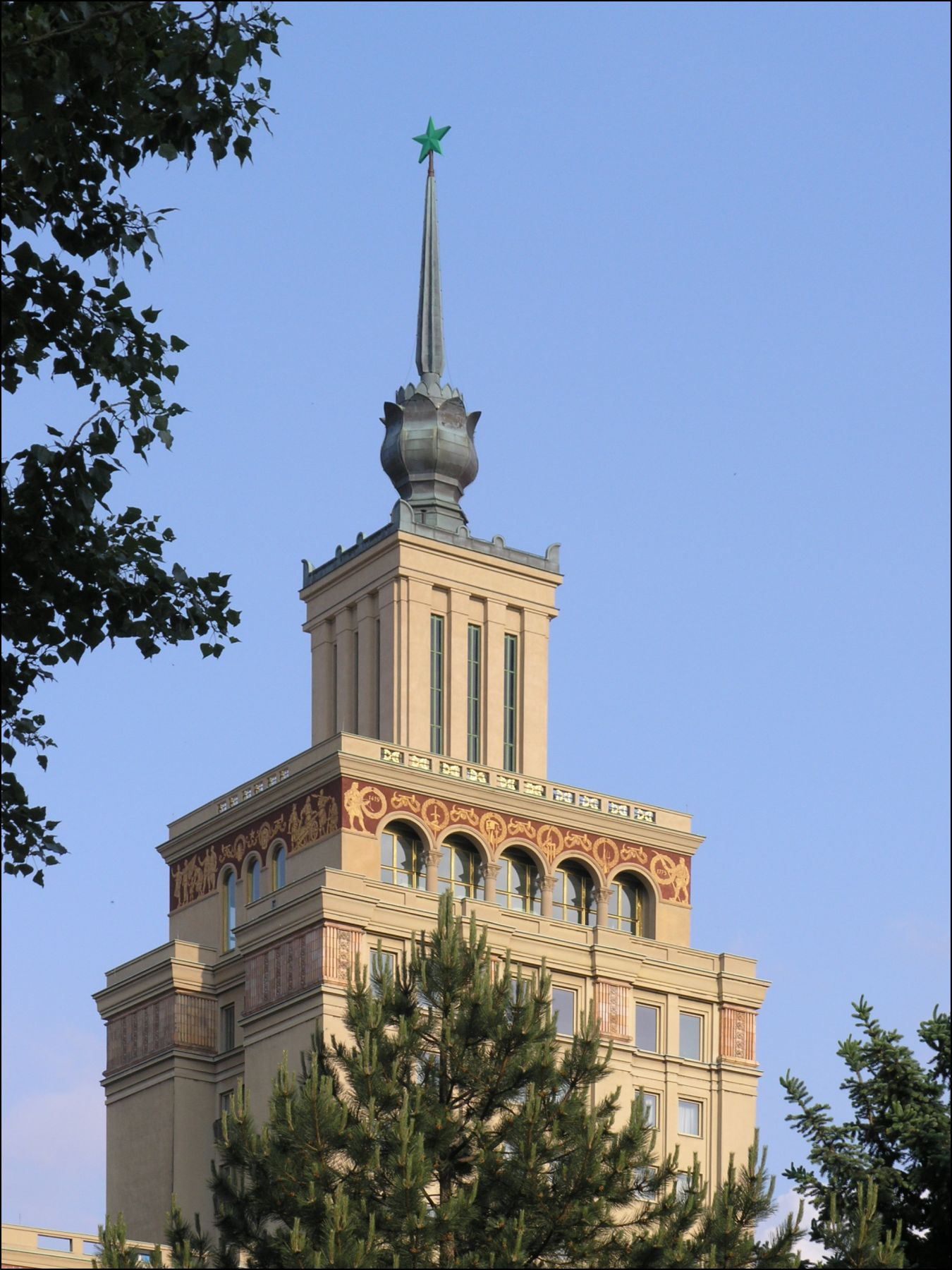 Hotel Crowne Plaza Prague, Praha-Dejvice